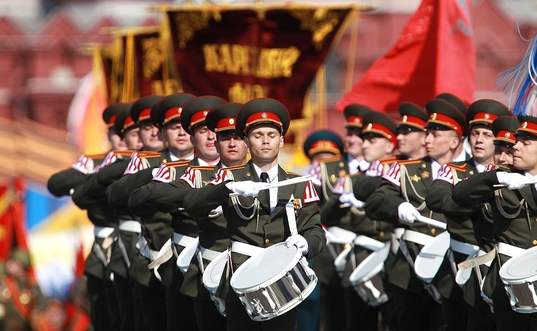 Военный парад, посвящённый 65-летию Победы в Великой Отечественной войне.